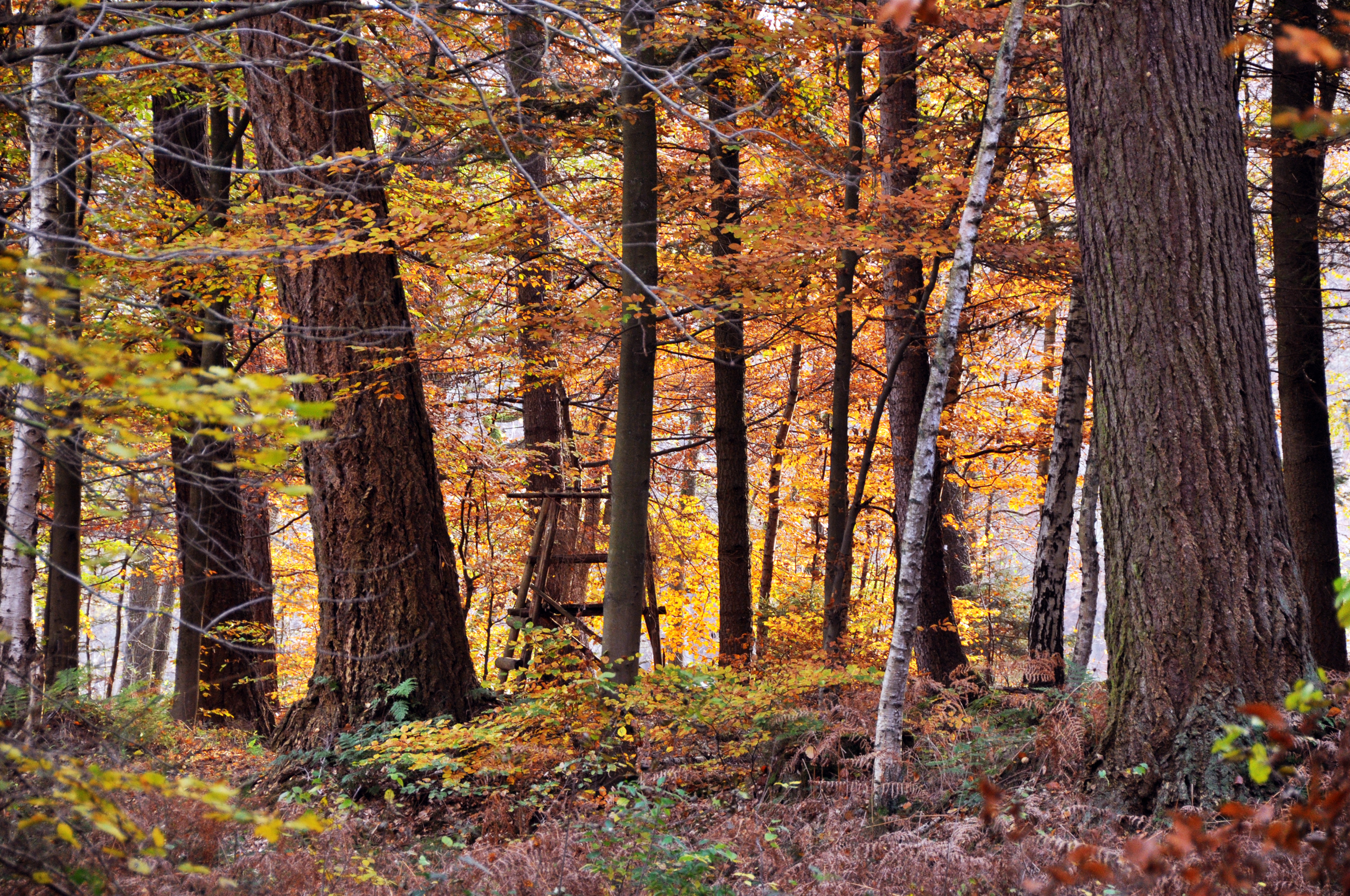 Krummesse, Lübeck, Germany